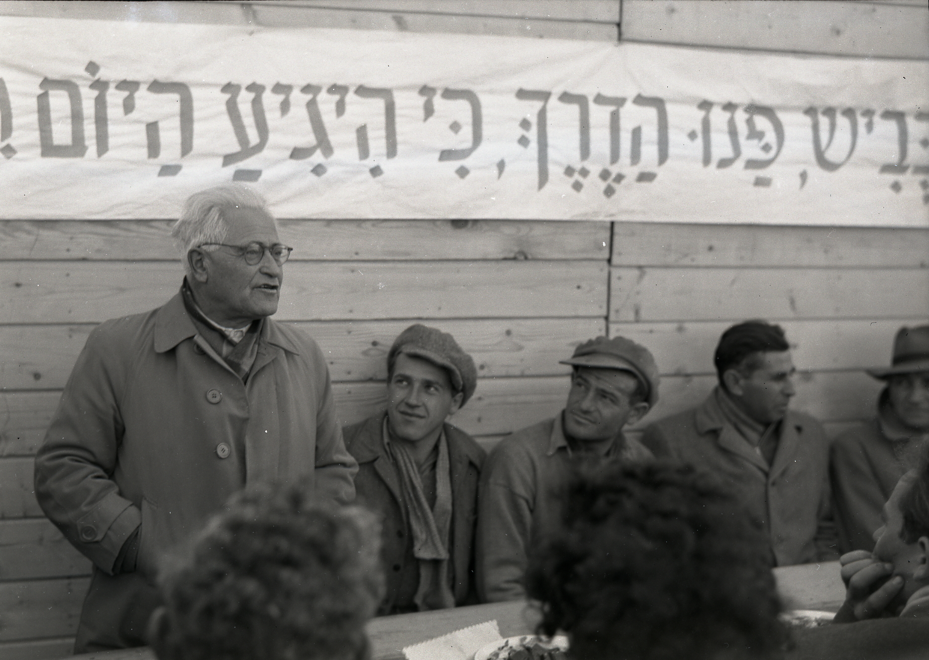 עליה לקיבוץ יסעור 2 צלם בנו רותנברג 1949 גנזך המדינה